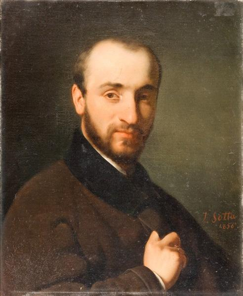 Elie Delaunay jeune